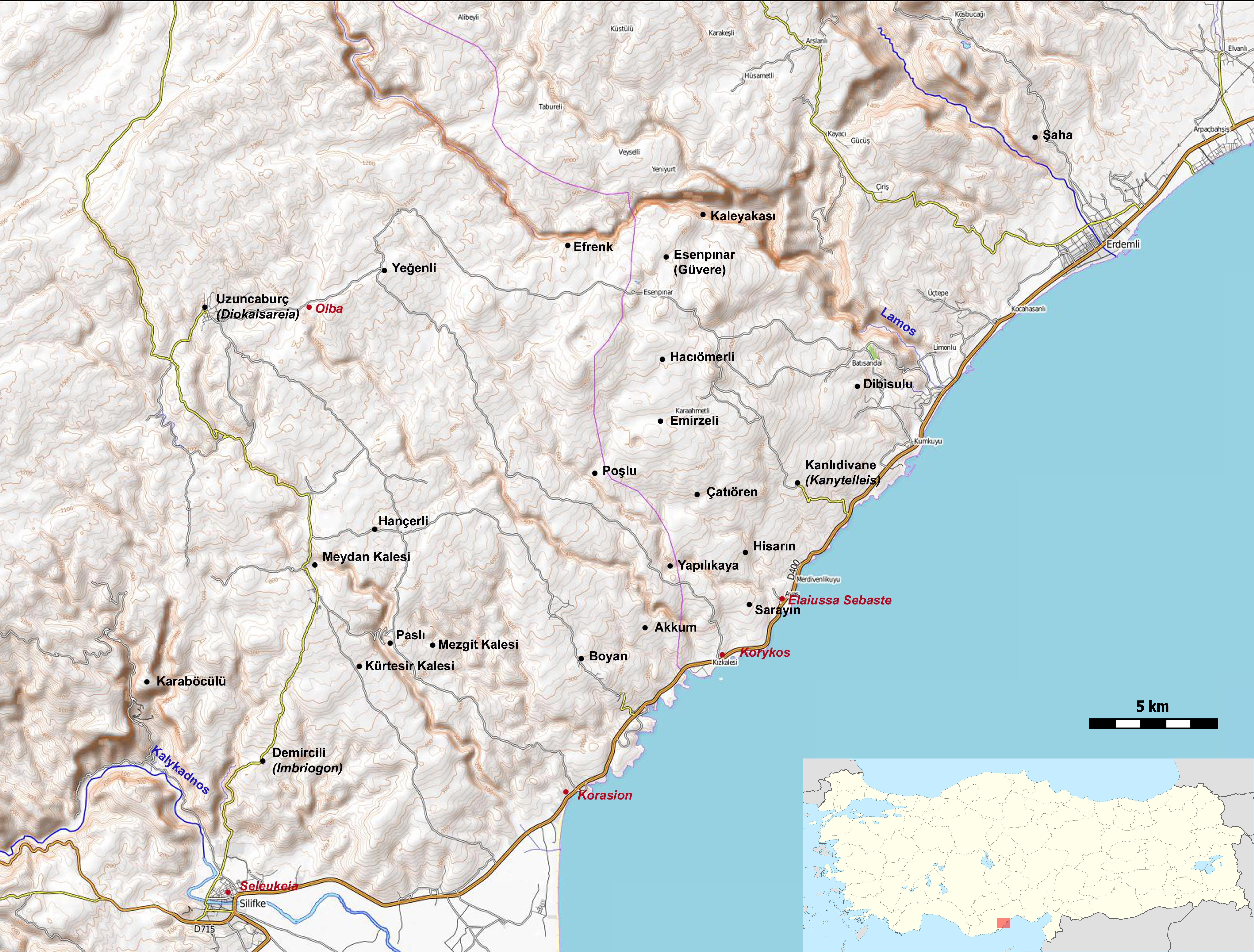 Verteilung der Olbischen Zeichen im Rauen Kilikien zwischen Kalykadnos und Lamos. Die rot beschrifteten Orte dienen nur der Orientierung und haben keine Olbischen Zeichen This map may be incomplete, and may contain errors. Don't rely solely on it for navigation.